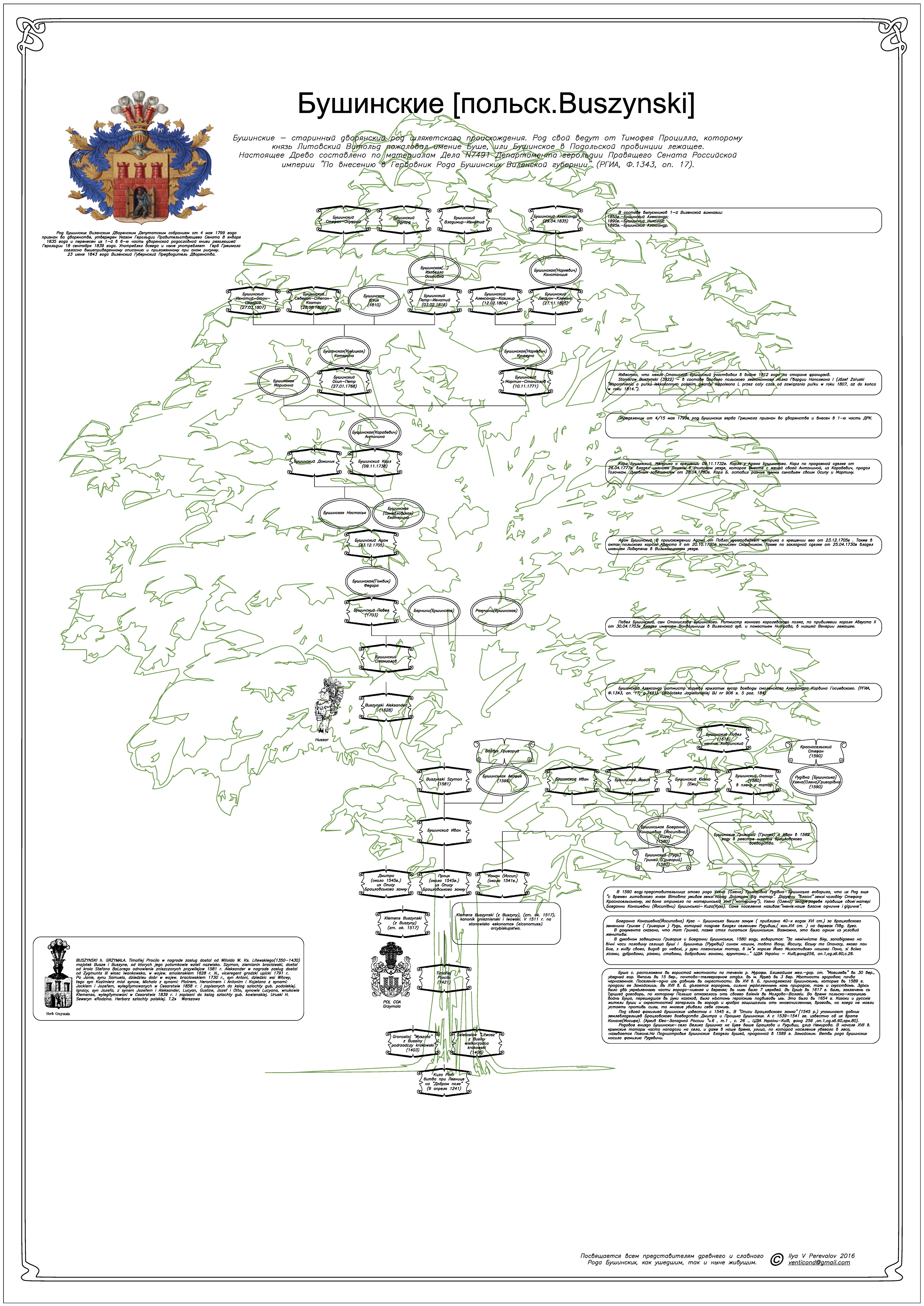 Родословное Древо Бушинских [Buszynski] Виленско-Ковенскиой губернии Российской империи. Составлено по материалам Дела 7491 Департамента Герольдии Правящего Сената.